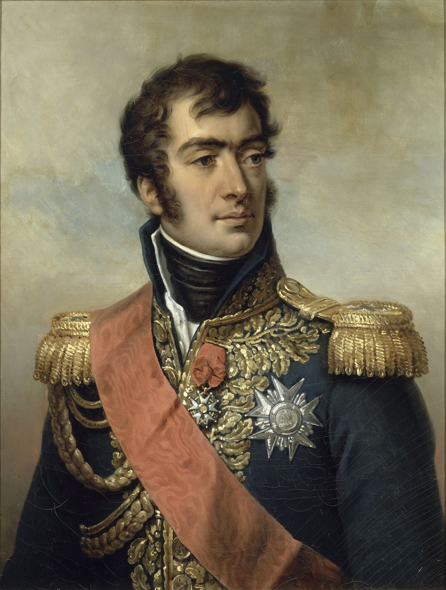 Commandé par Louis-Philippe pour le musée historique de Versailles en 1834